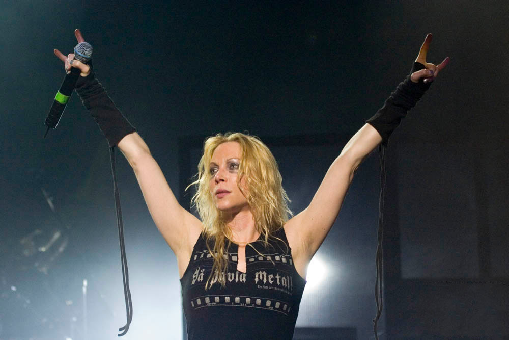 Angela Gossow from Arch Enemy, Via Funchal - São Paulo, Brasil